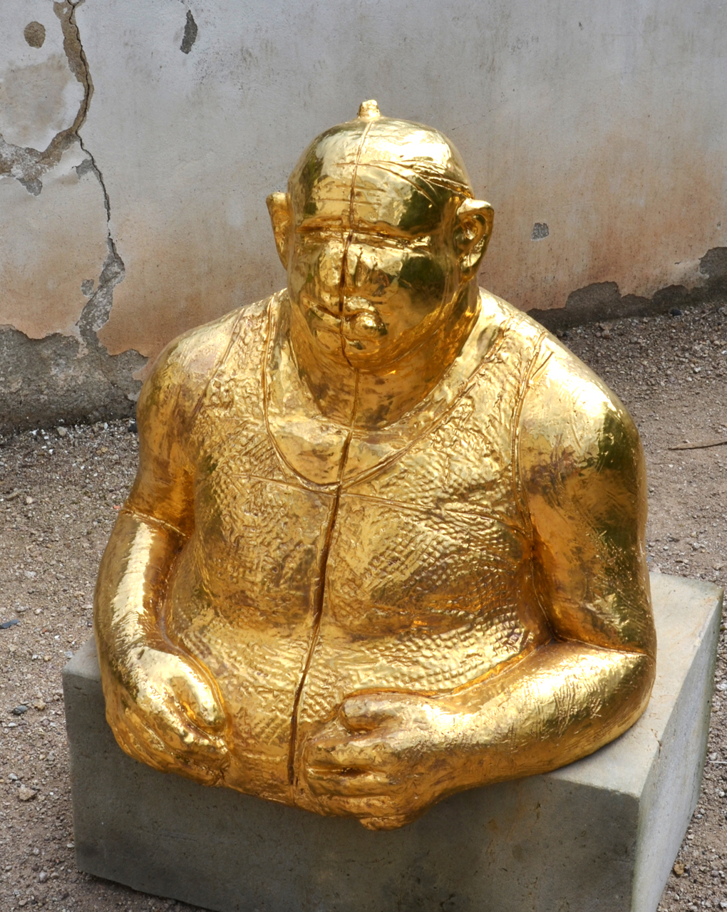 Bohumil Zemánek, Béda, zlatej kluk (1972)